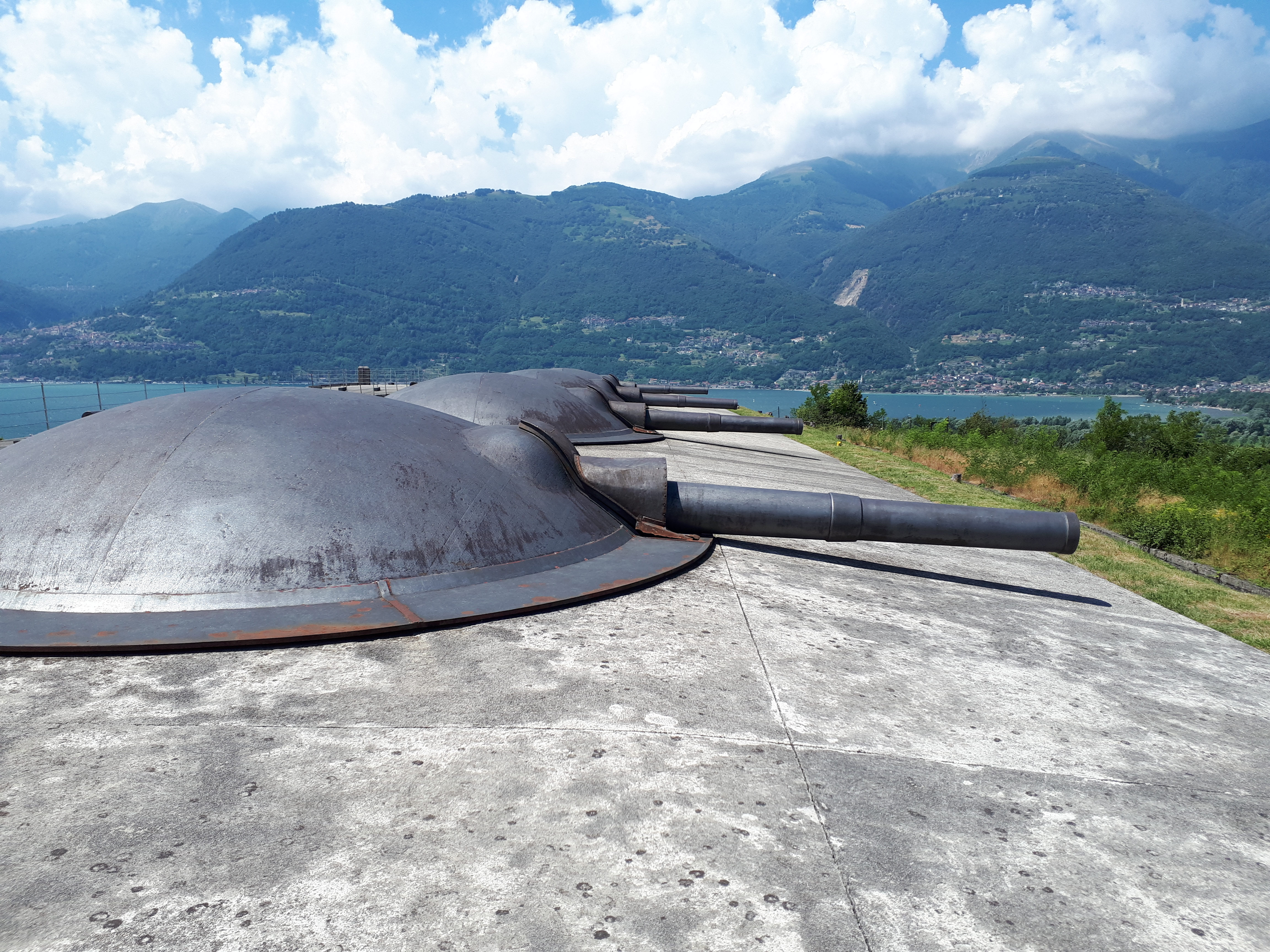 Forte Montecchio Nord This is a photo of a monument which is part of cultural heritage of Italy.